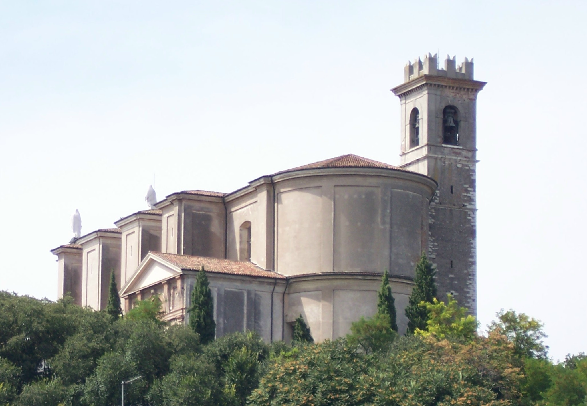 retro parrocchiale